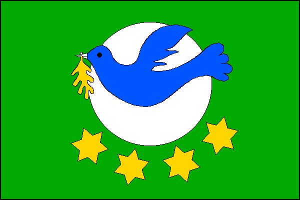 Vlajka obce Rajhradice